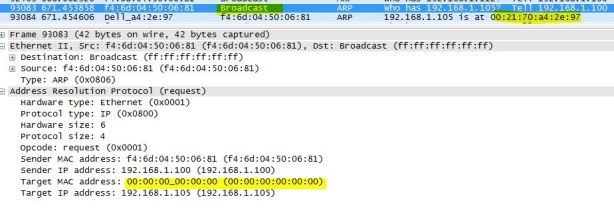 Монгол: Ингэж ARP table – ийг сүлжээн дэх бүх л төхөөрөмжүүд өөр дээрээ байгуулдаг байх нь